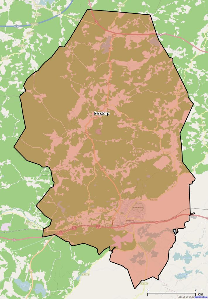 Distriktsindelningen i Perstorps kommun World file: 36.4806708407225031 0 0 -36.4806708407225031 1474971.79977108957245946 7613385.900974091142416